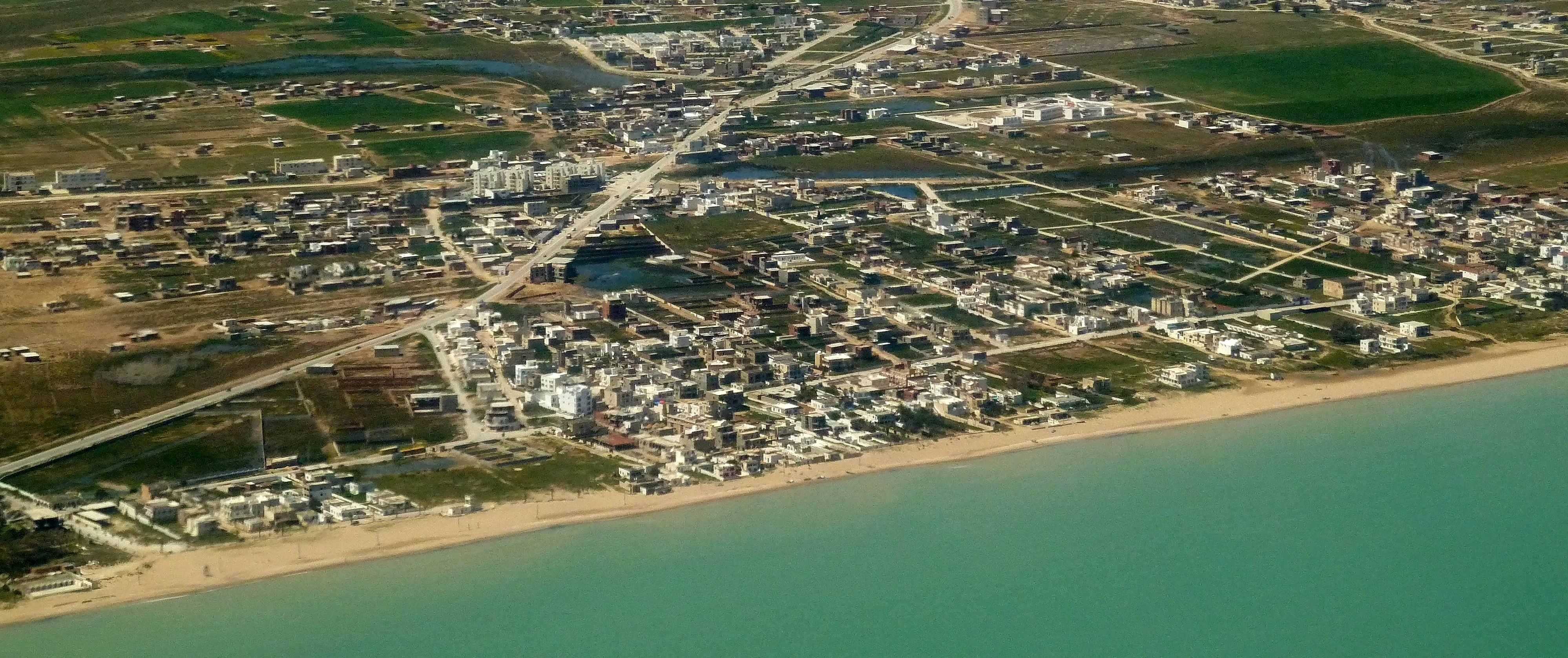 Vue aérienne du village Raoued dans la banlieue nord de Tunis